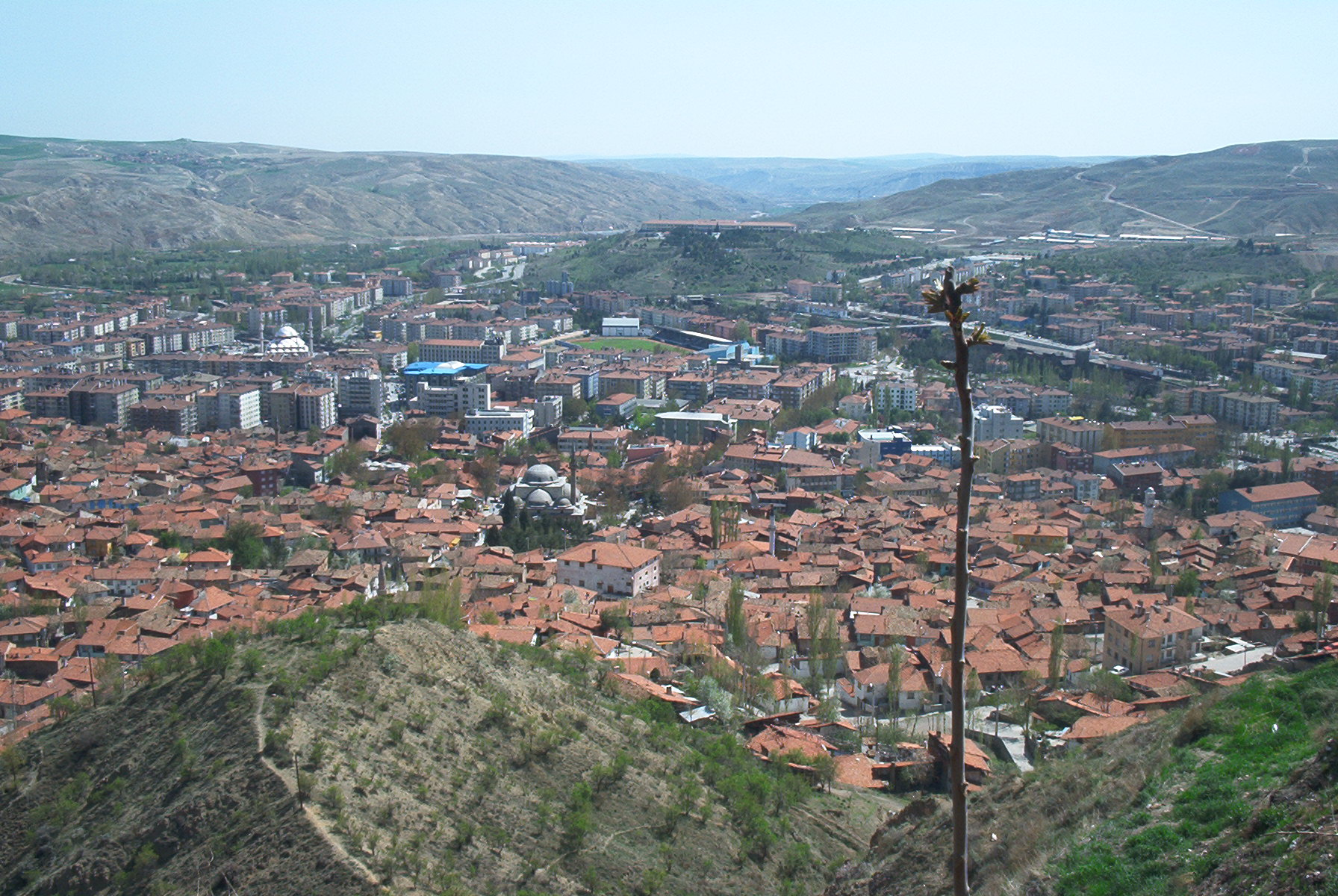 Çankırı from Çankırı Castle